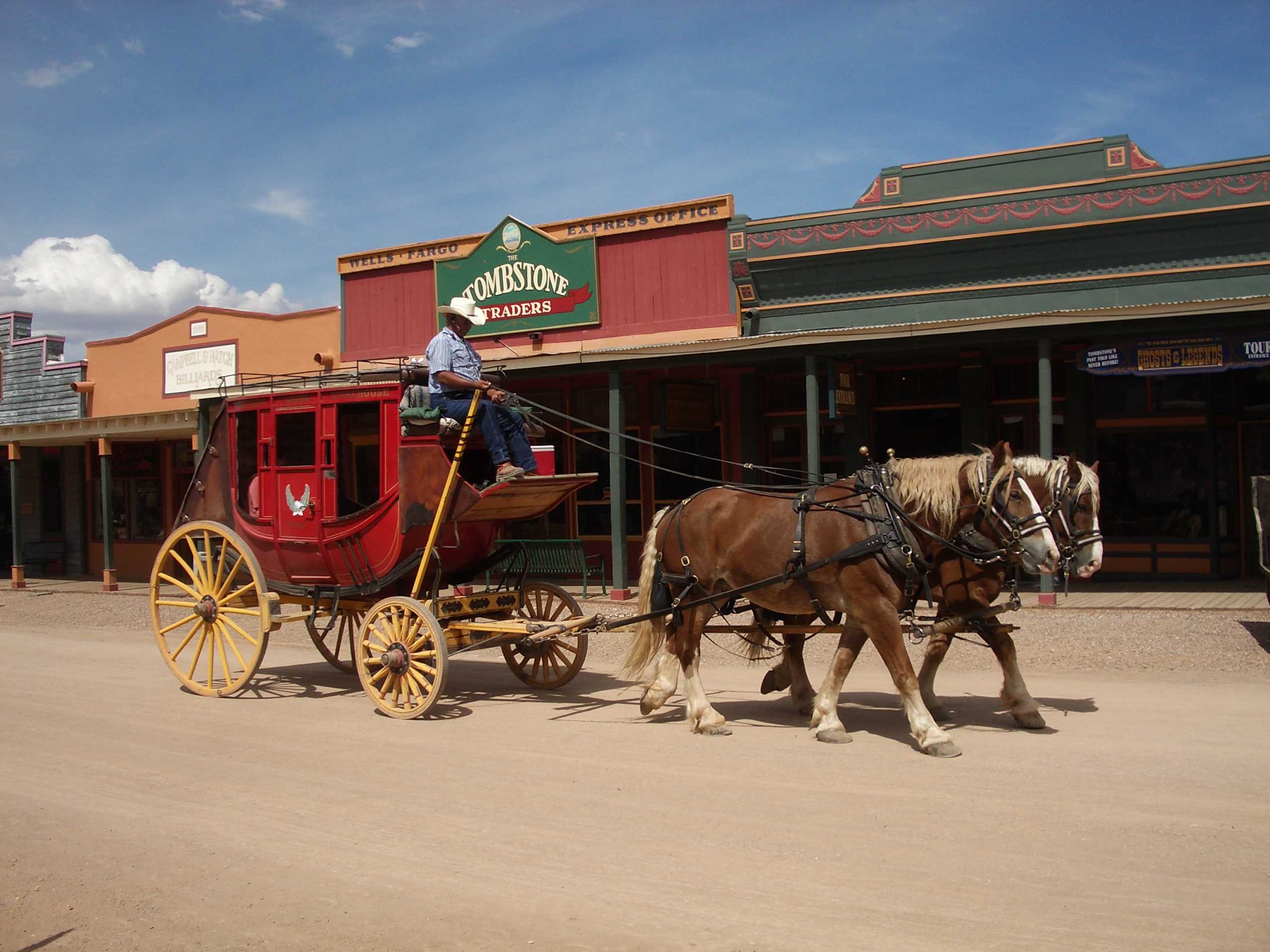 Une dilligence (animation touristique) dans Allen Street à Tombstone (Arizona)